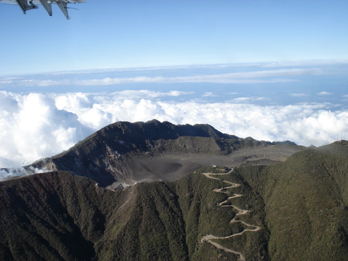 Fotografía del Volcán Turrialba